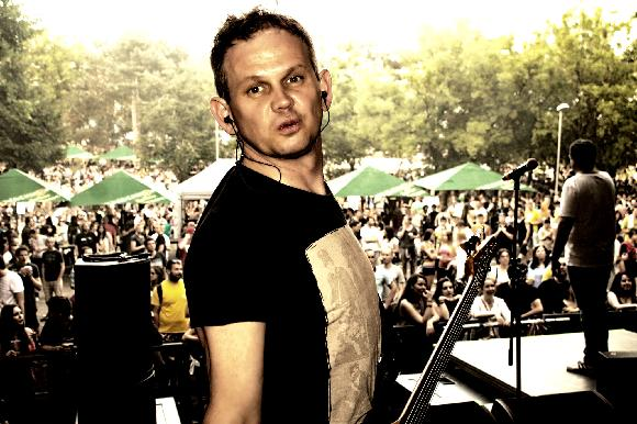 bass -hrnec v akci